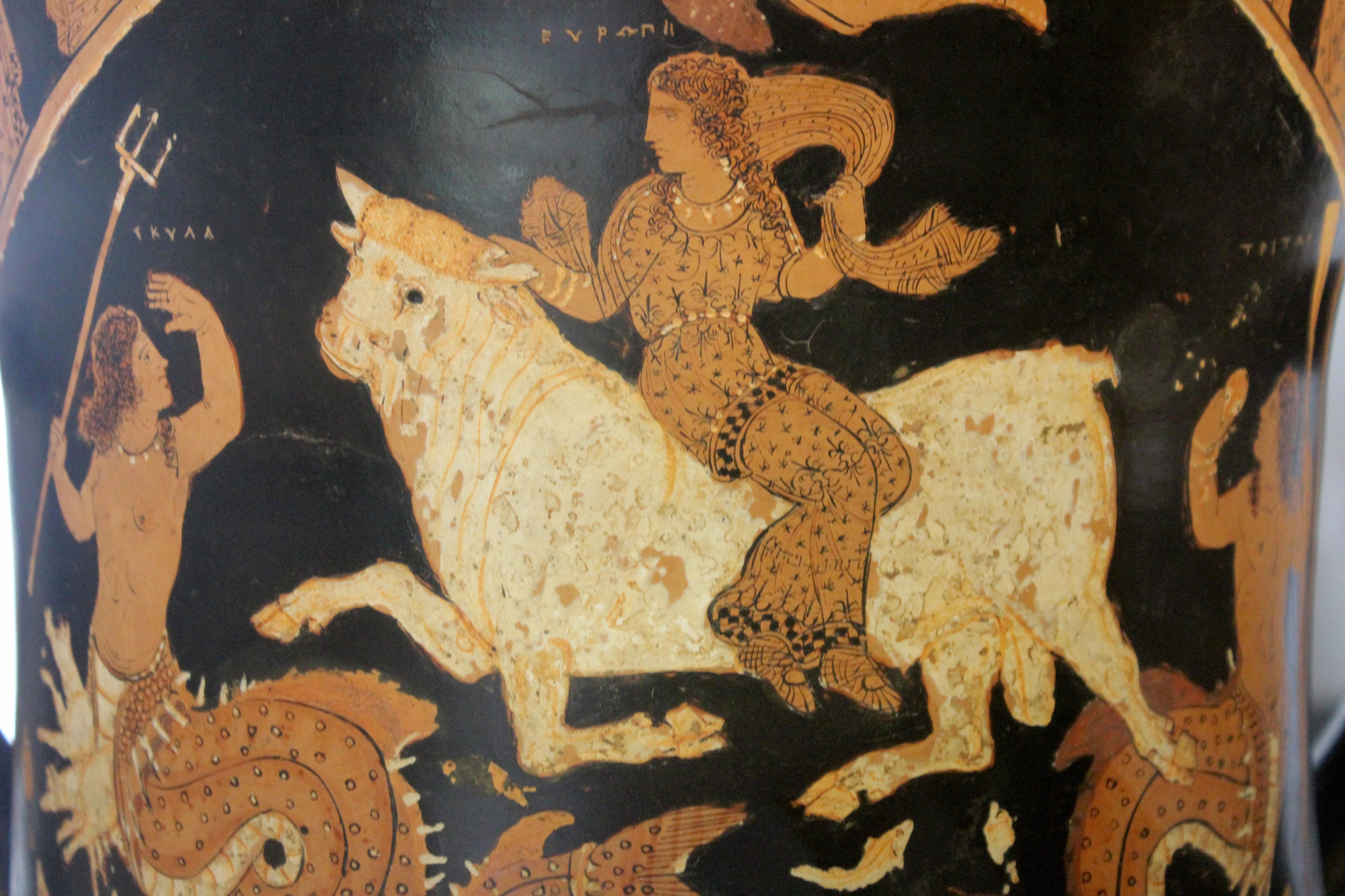 Paestum. Museo Archeologico. Cratera de Asteas con el rapto de Europa.